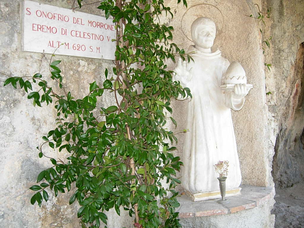 Eremo di Sant'Onofrio al Morrone Foto personale concessa in PD